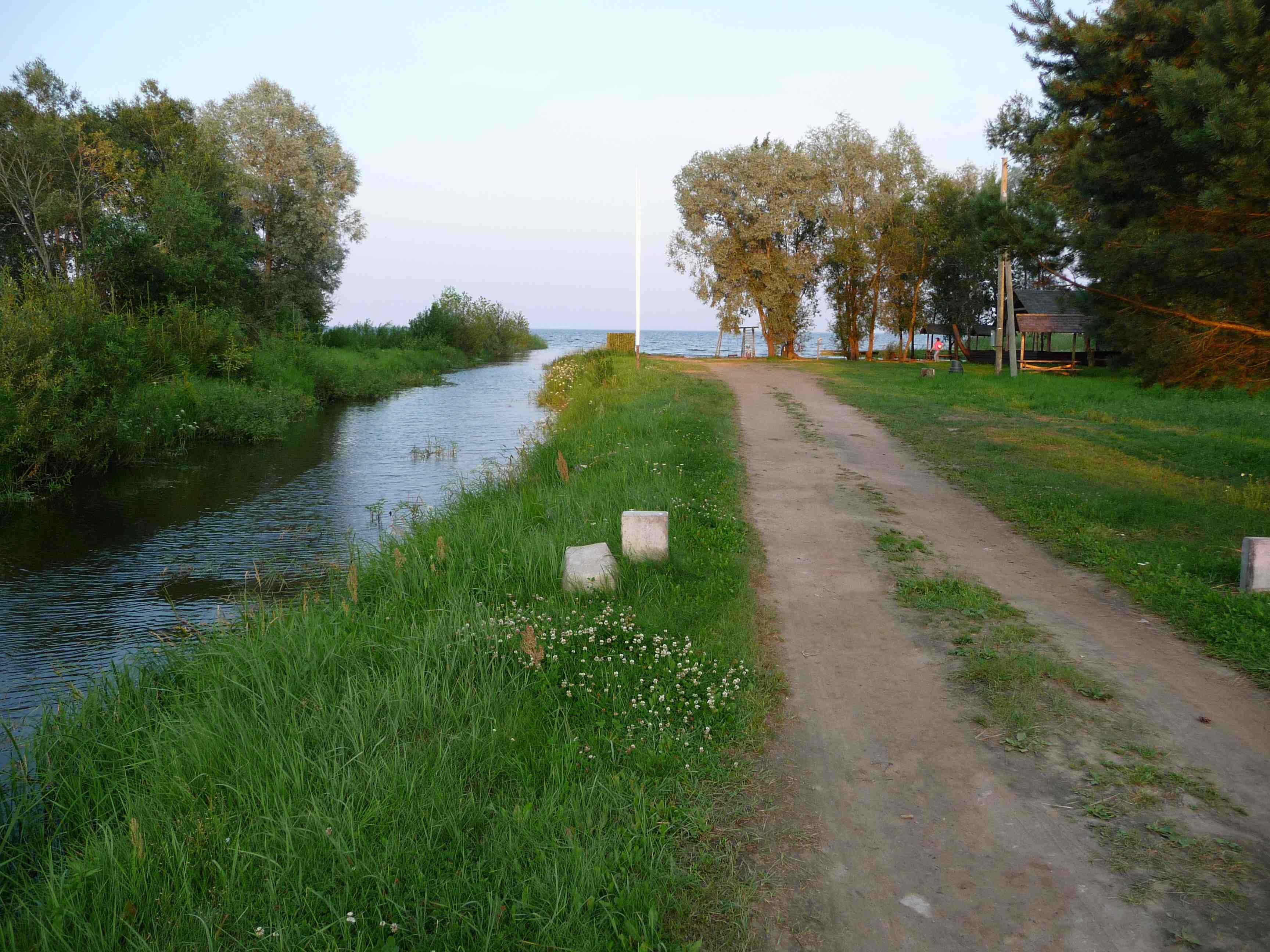 Am Peipussee